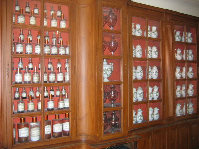 Apothicairie, Hospices de Beaune, Bourgogne, France.